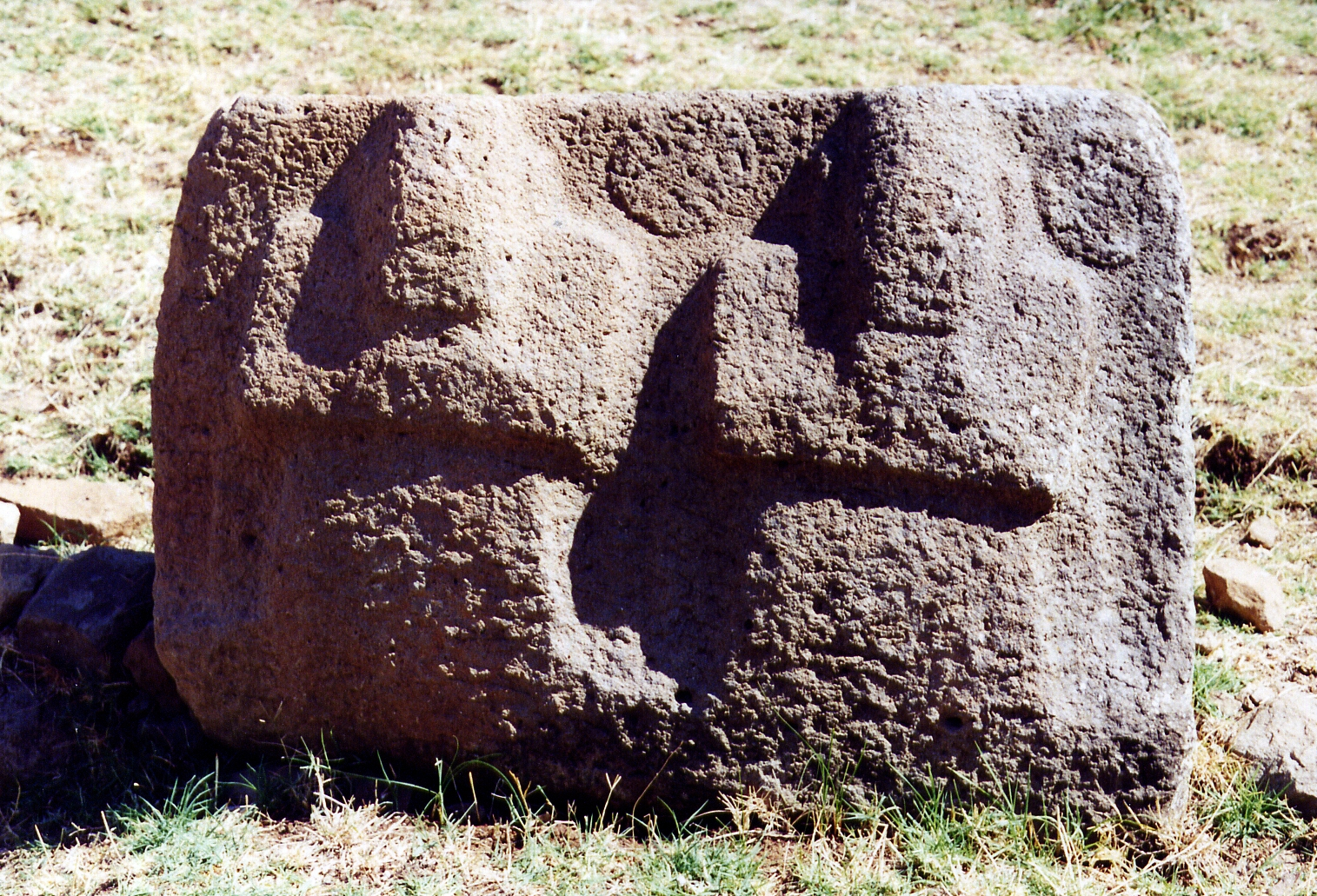 Yesemek, Hethitische Bildhauerwerkstatt, Südosttürkei, Berggötter